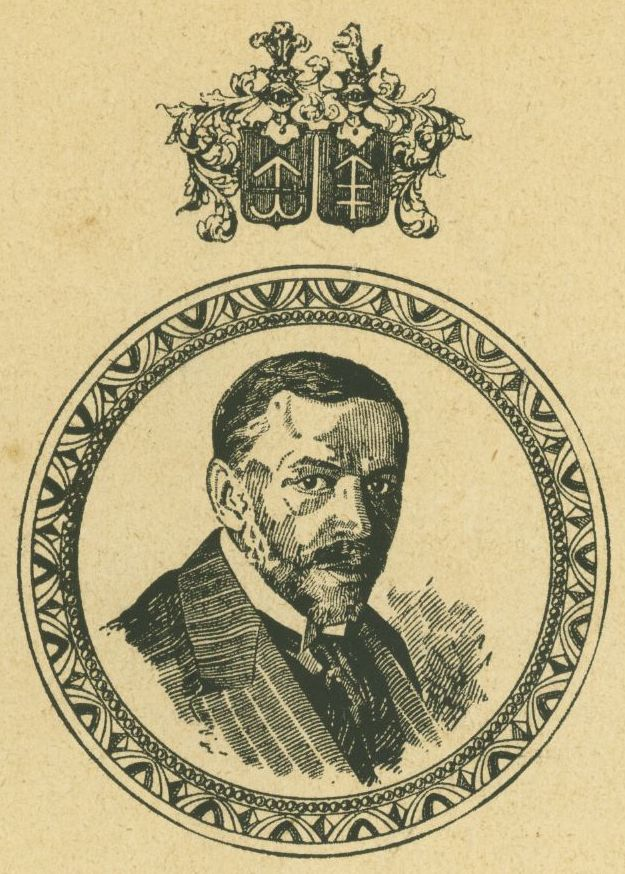 Self-portrait